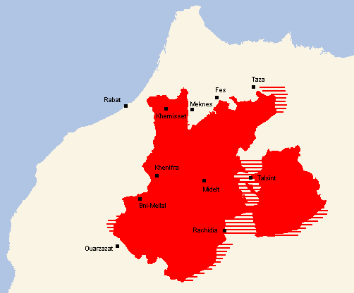 Aire linguistique - Tamazight Central